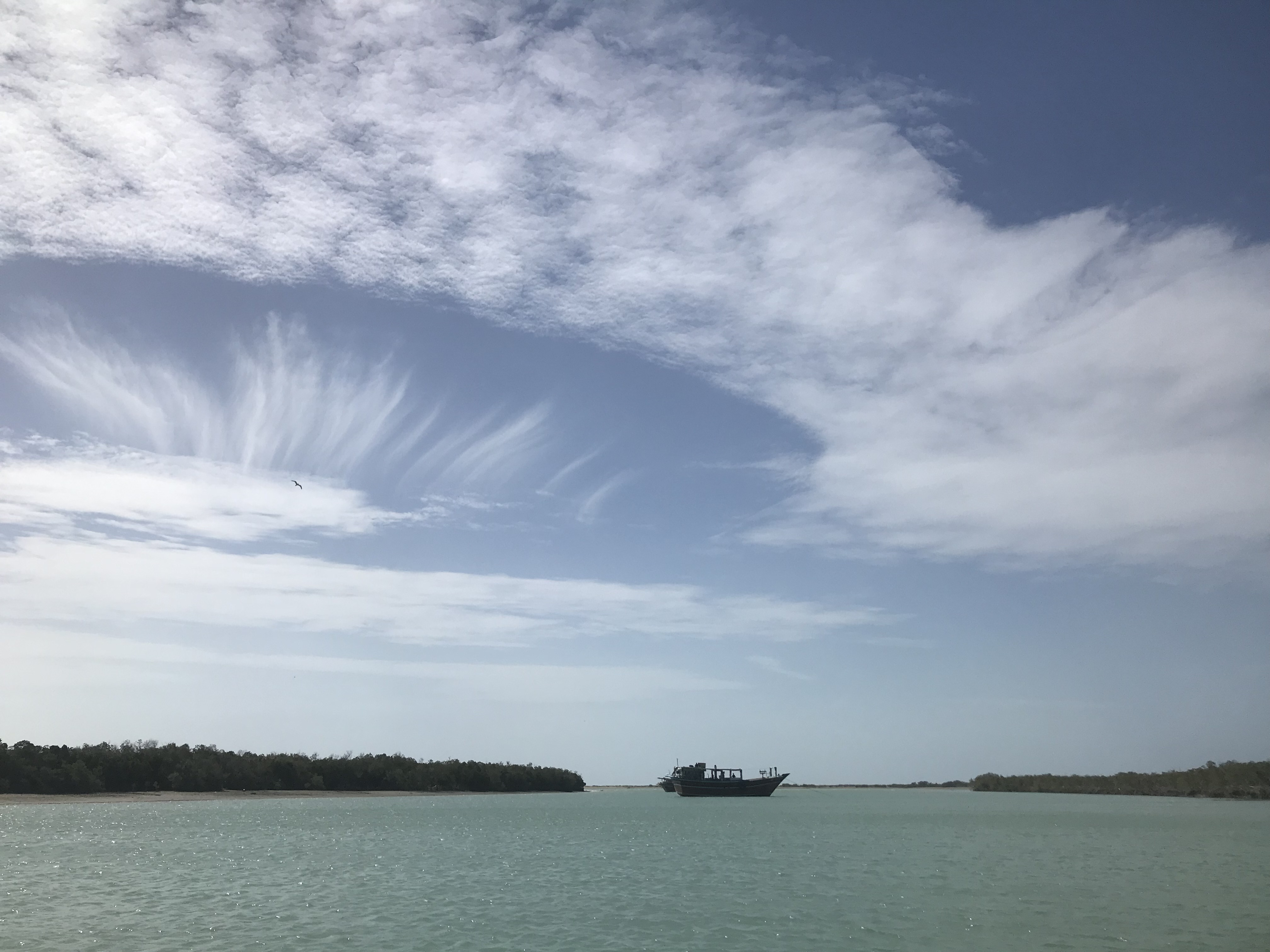 تالاب بین المللی خور آذینی-شهرستان سیریک-استان هرمزگان-ایران